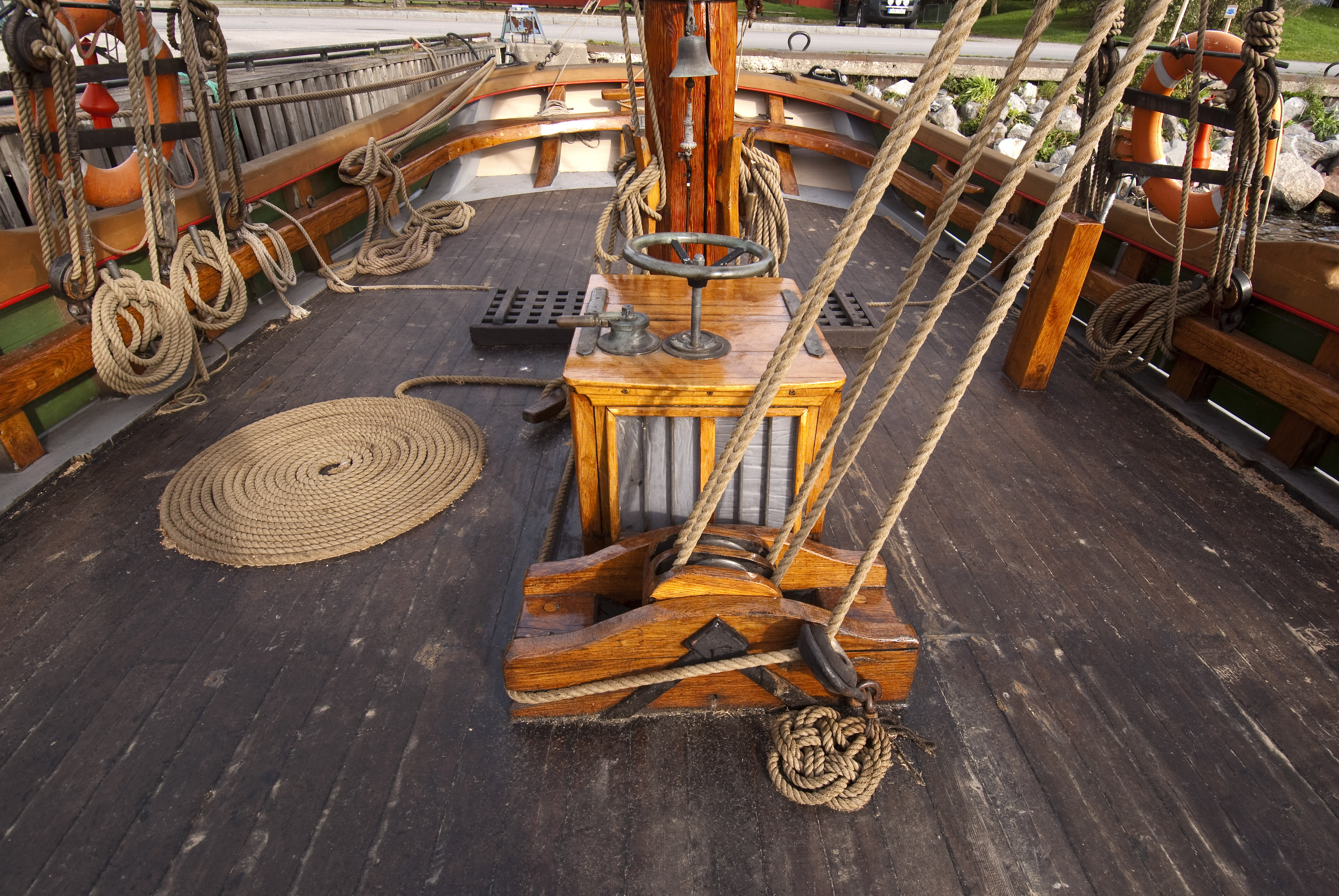 Det K-märkta fartyget Deodar vid Djurgården, Stockholm.